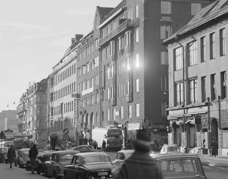 Klarabergsgatan 56-64 västerut. Dåvarande kv. Svanen, nu kv. Orgelpipan 7. Svanen 5 & 6, arkitekt Knut Perno